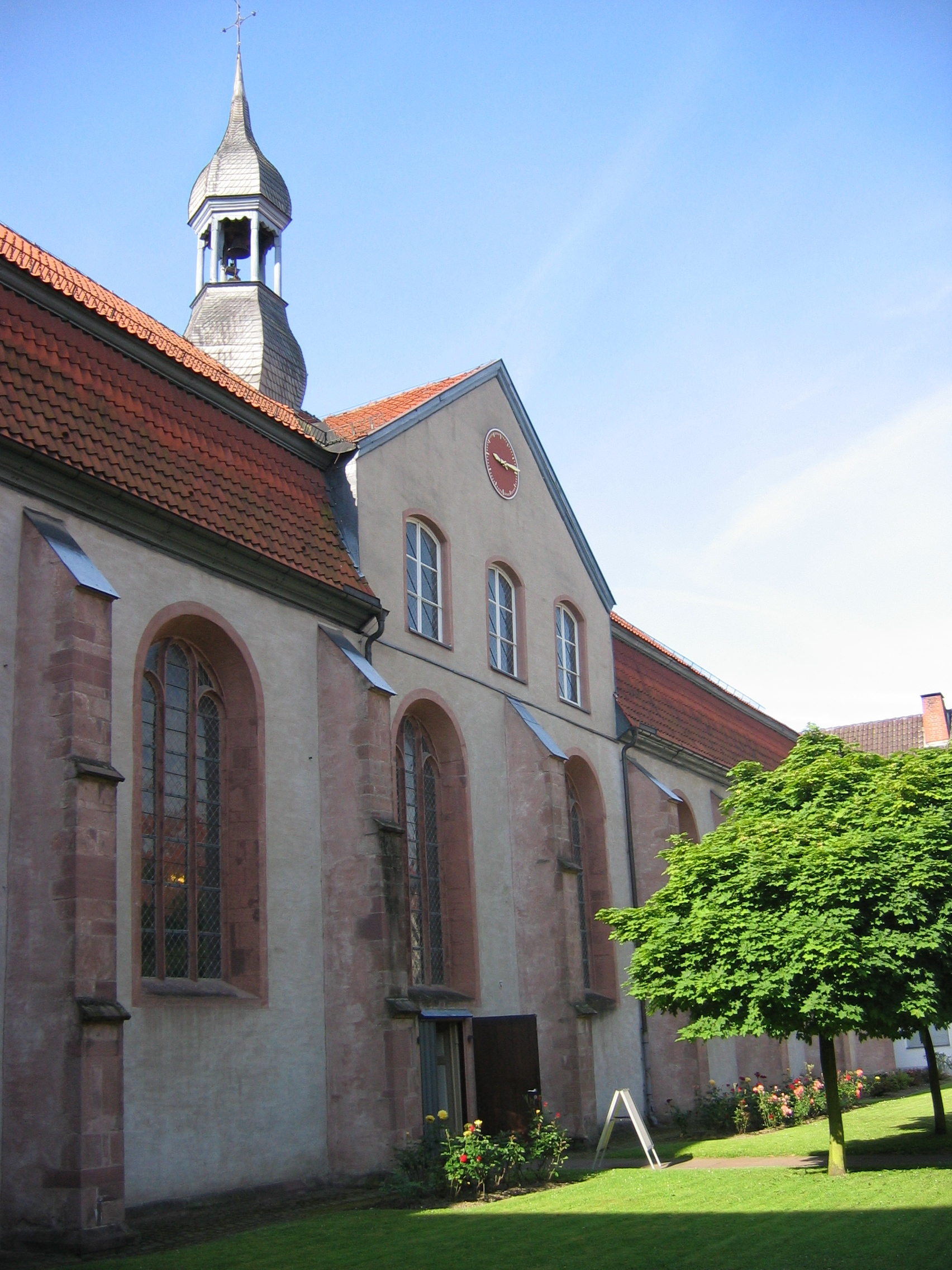 Außenansicht der Kirche